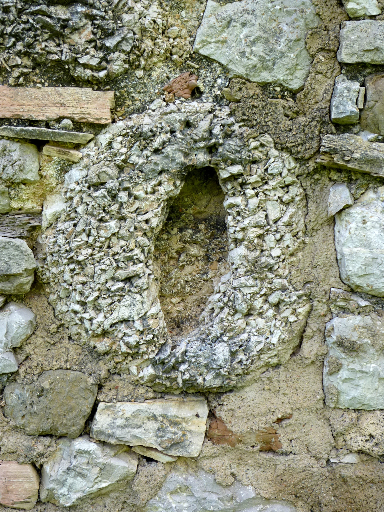 Motiu decoratiu fet en bretxa a la façana de la capella de Sant Cristòfol de Pasqüets, a la Coma i la Pedra.